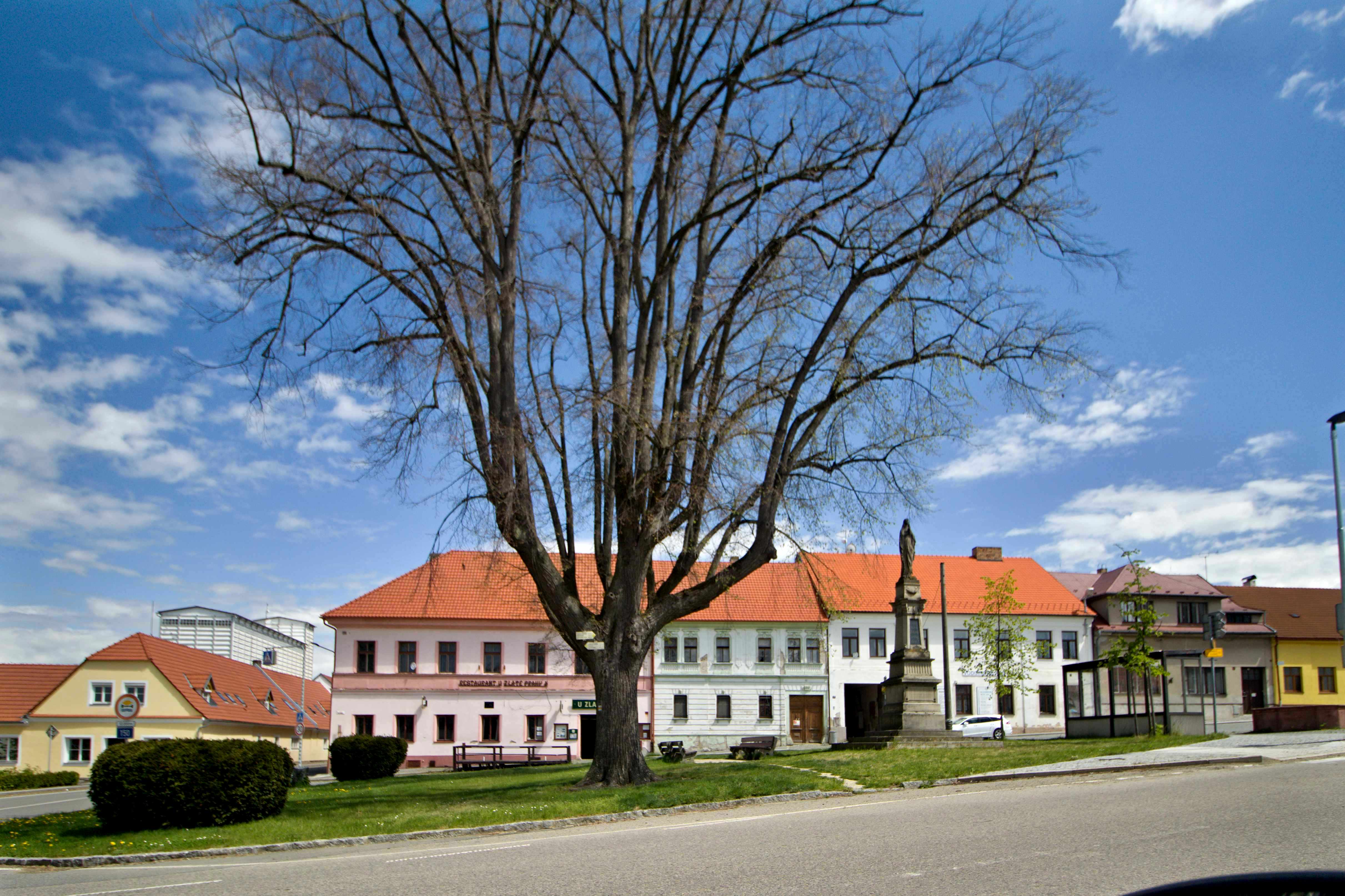 Čechtice, okr. Benešov náves